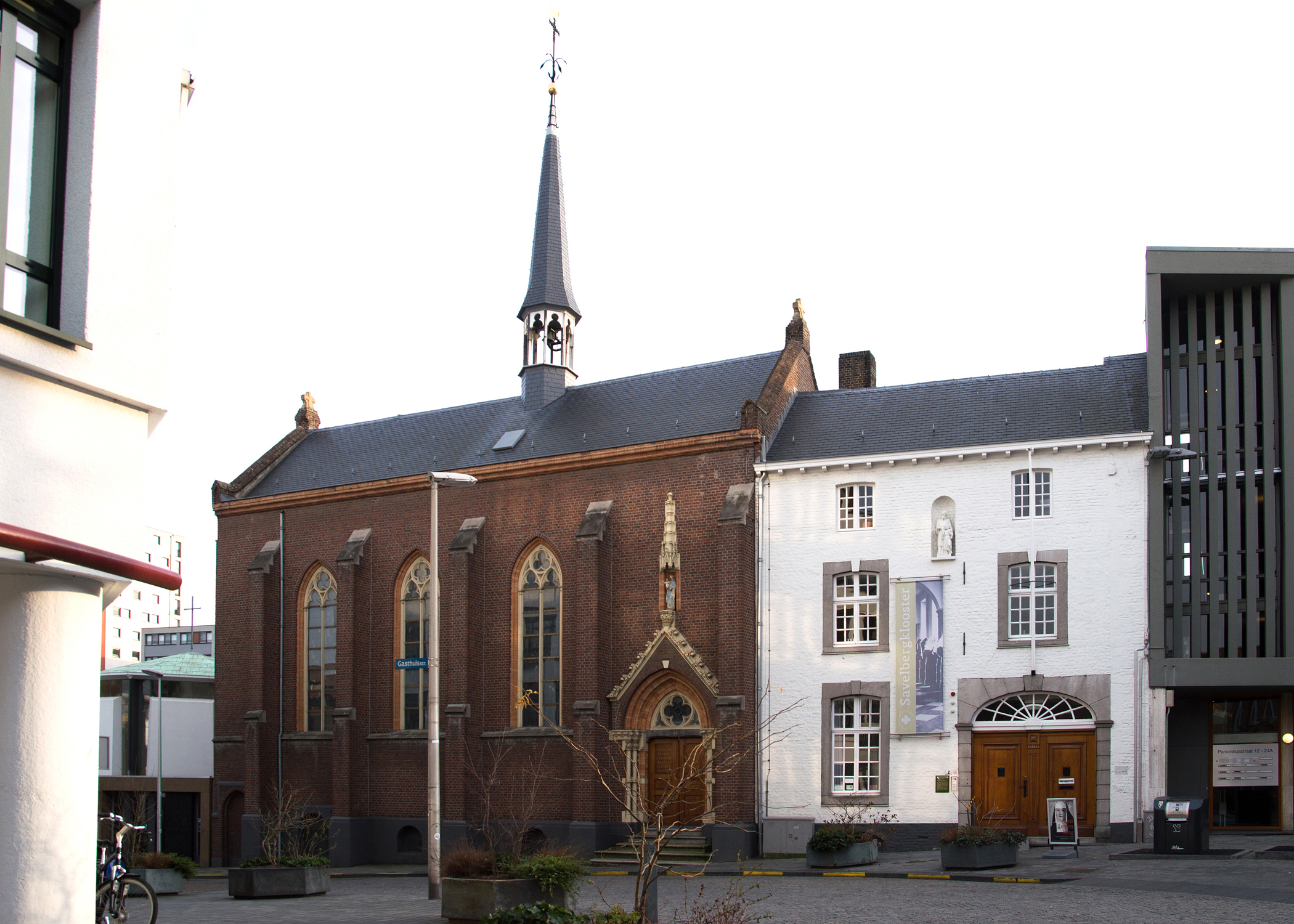 kapel en klooster van de Kleine Zusters van de H. Joseph aan de Gasthuisstraat te Heerlen